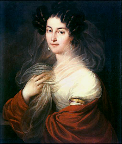 Portret Celiny z Sulistrowskich Radziwiłłowej